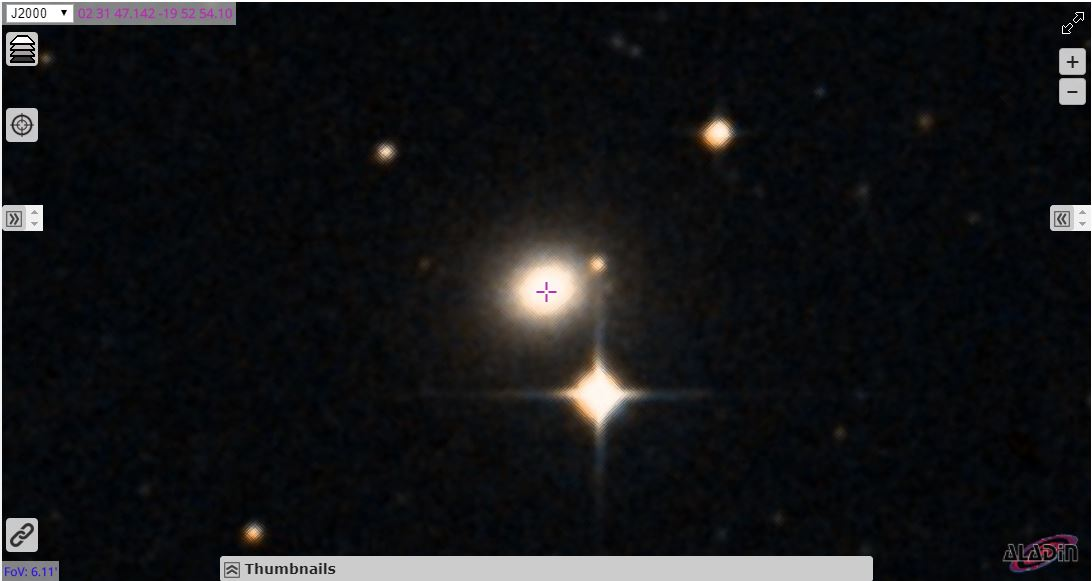 Ces images sont des captures d'écran de la région et de l'objet astronomique affichés par le programme Aladin/Lite que l'on peut utiliser à l'adresse suivante : Le lien dans le texte de la légende permet d'accéder à Aladin Lite et à l'image interactive de l'objet.